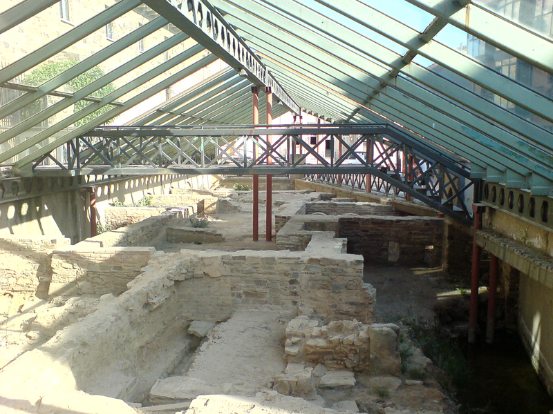 Restos de Asturica Augusta en Astorga.